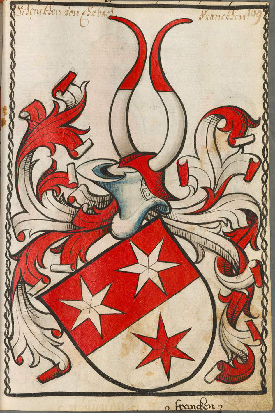 Scheibler'sches Wappenbuch , älterer Teil Erbach